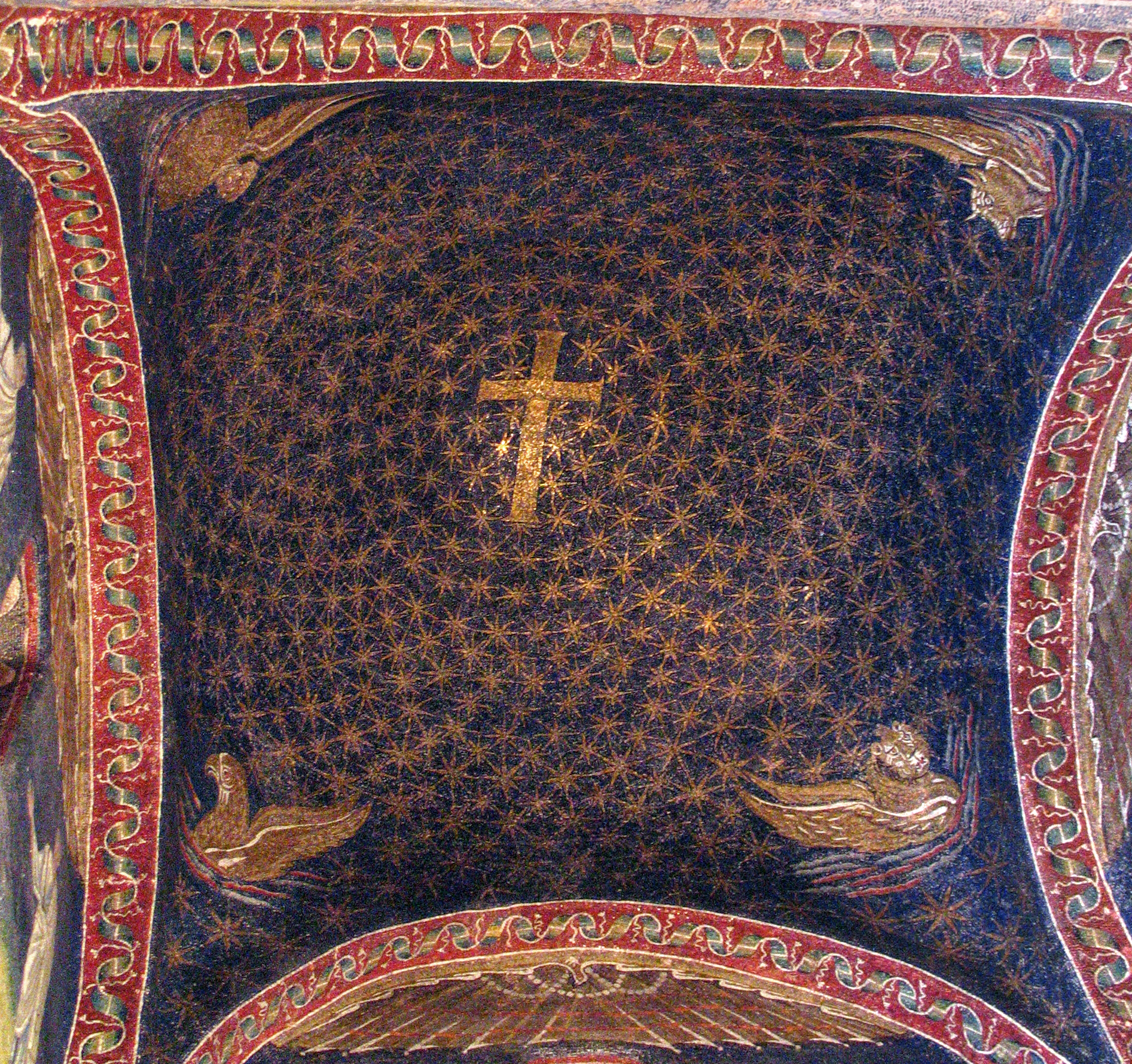 Mausoleum der Galla Placidia in Ravenna, Italien. Deckenmosaik